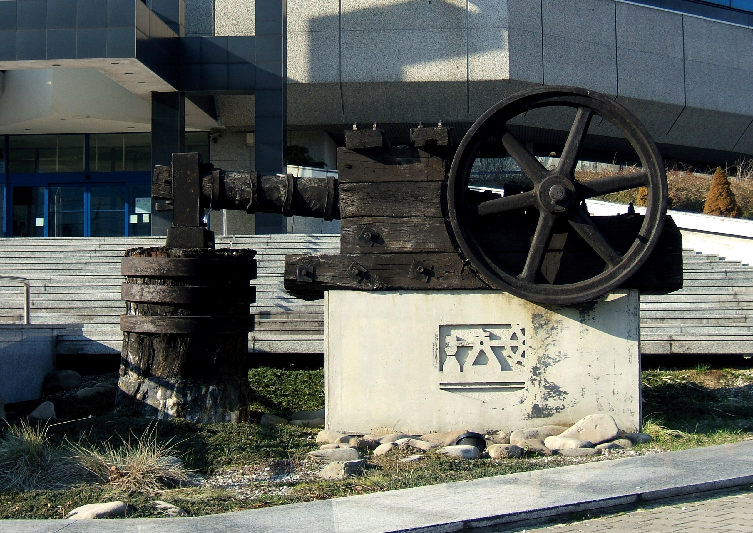 Historischer Eisenhammer vor der Schlesischen Bibliothek zu Kattowitz.